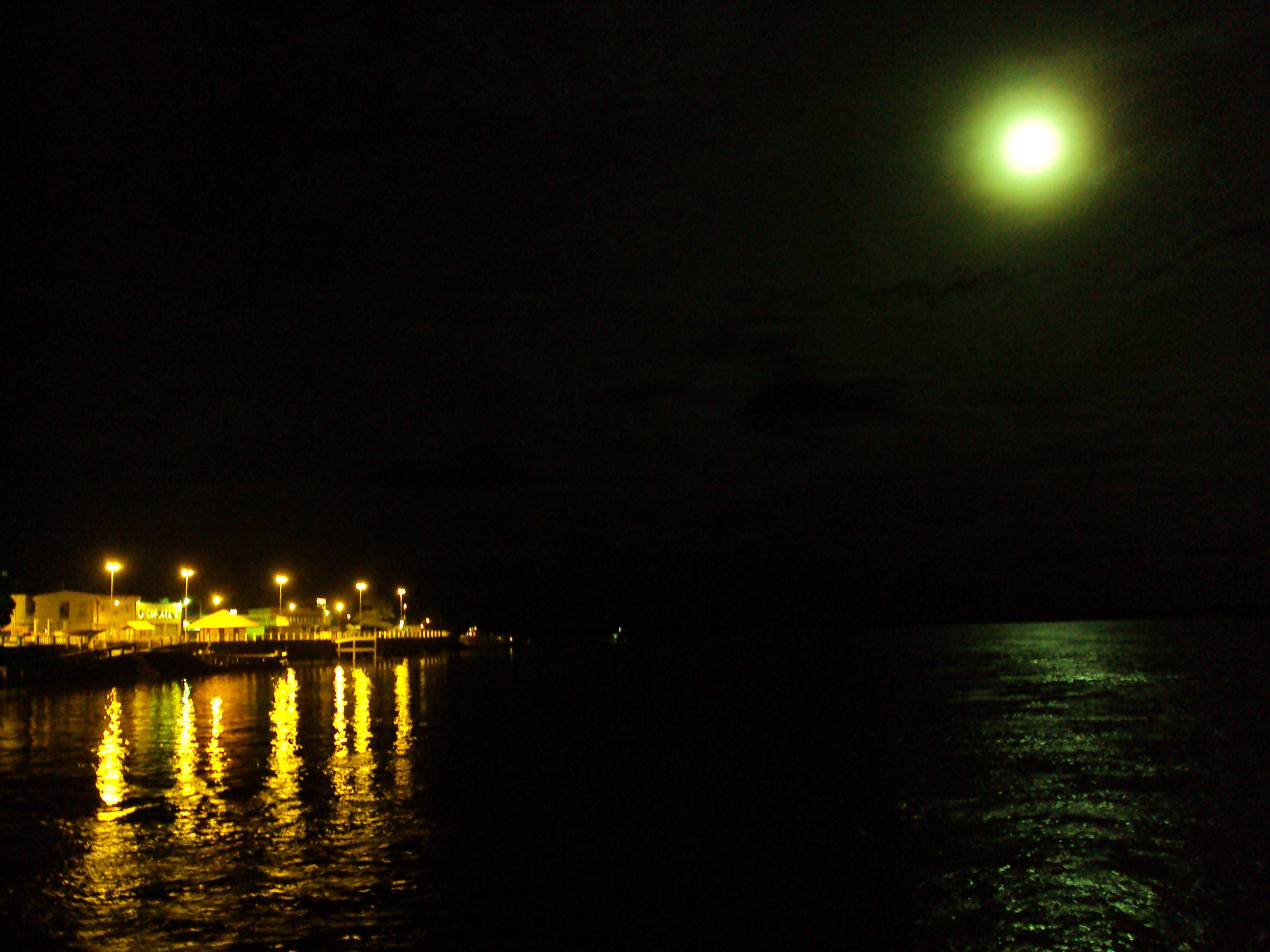 Orla (8) de Itaituba